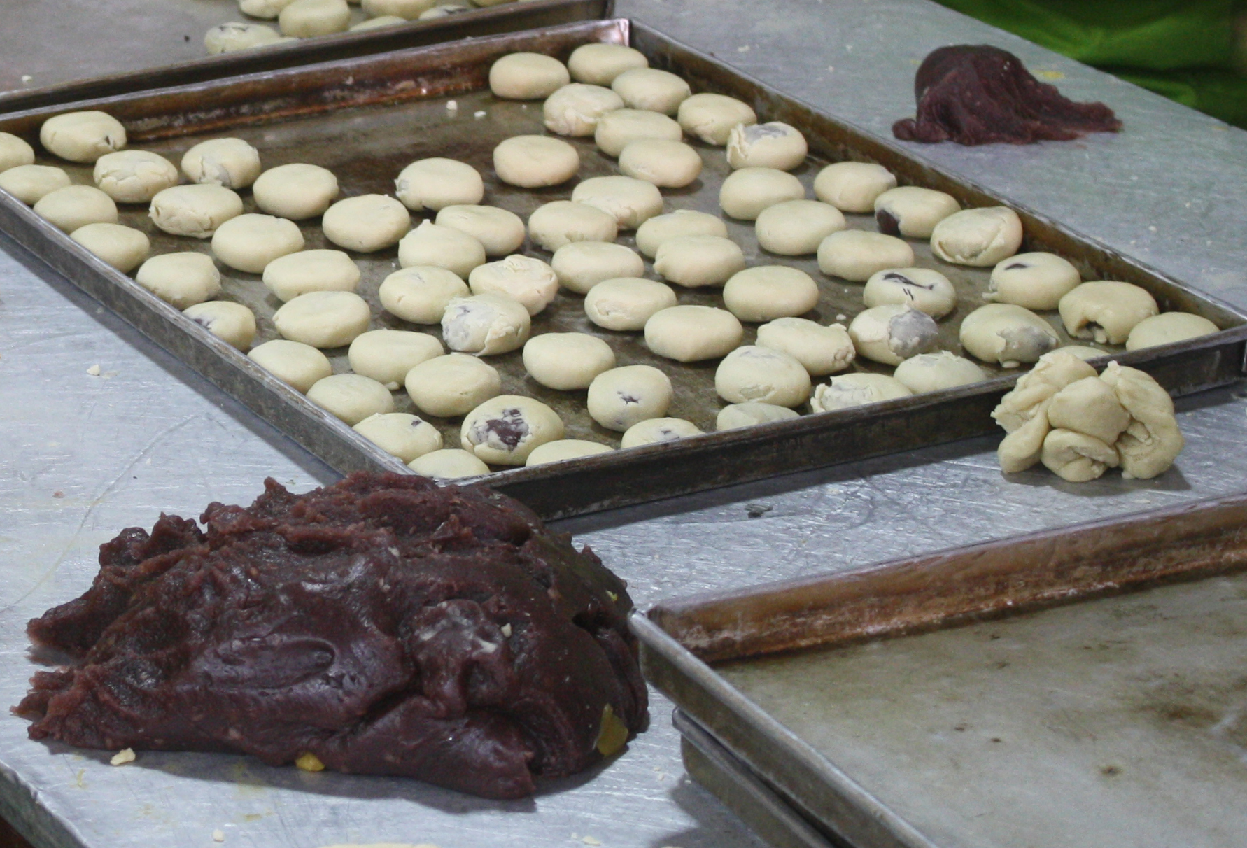 Jawa: proses ngawene bakpia